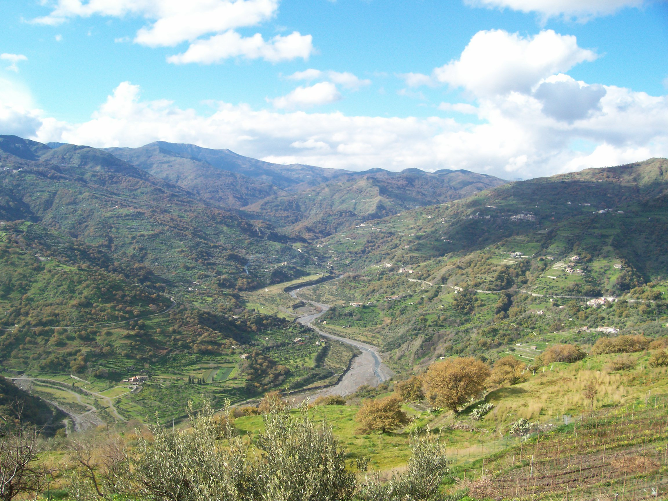 Francesco Miano, panorama valle d'Agrò scattata dal comune di Casalvecchio Siculo.